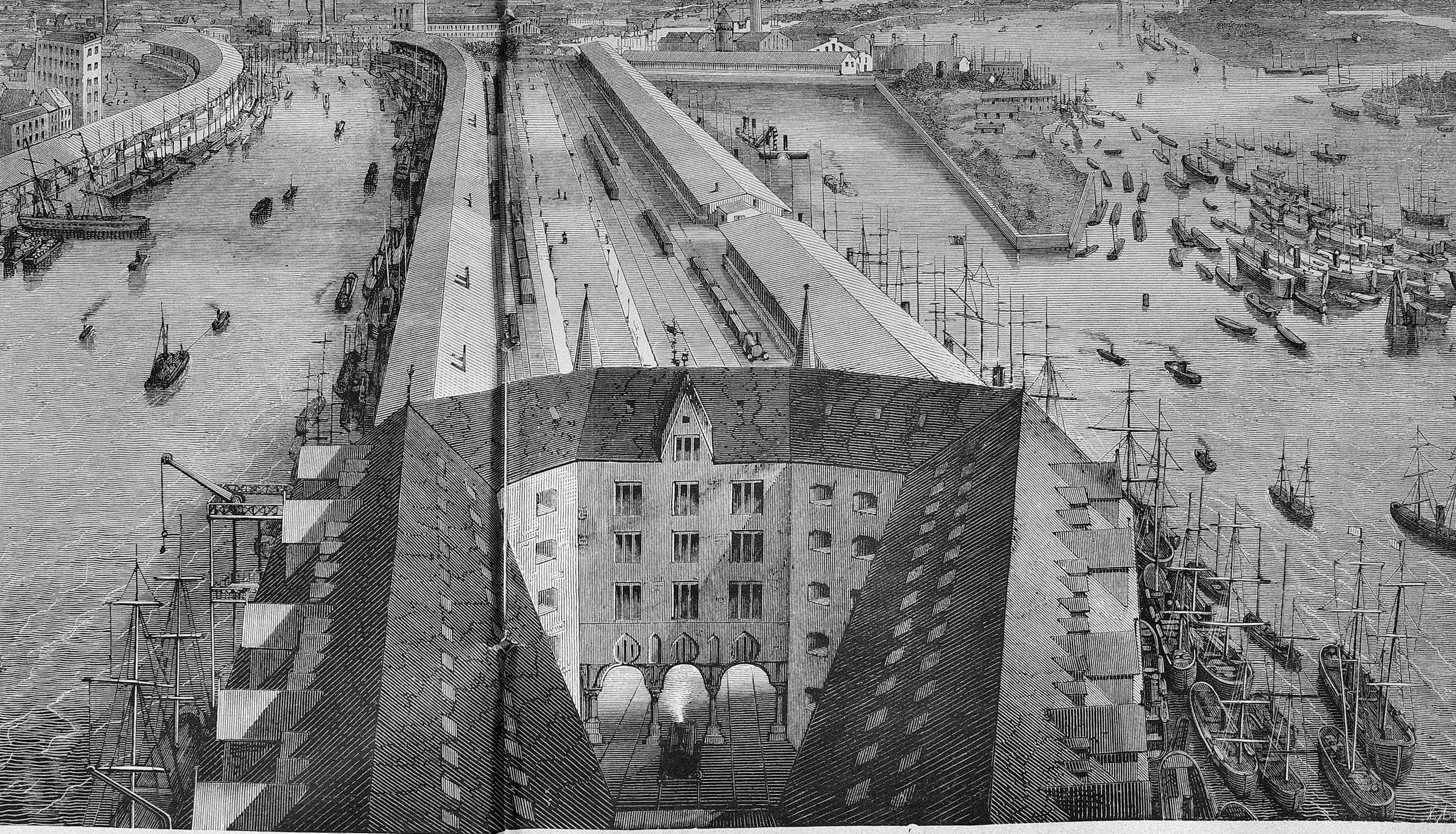 detail